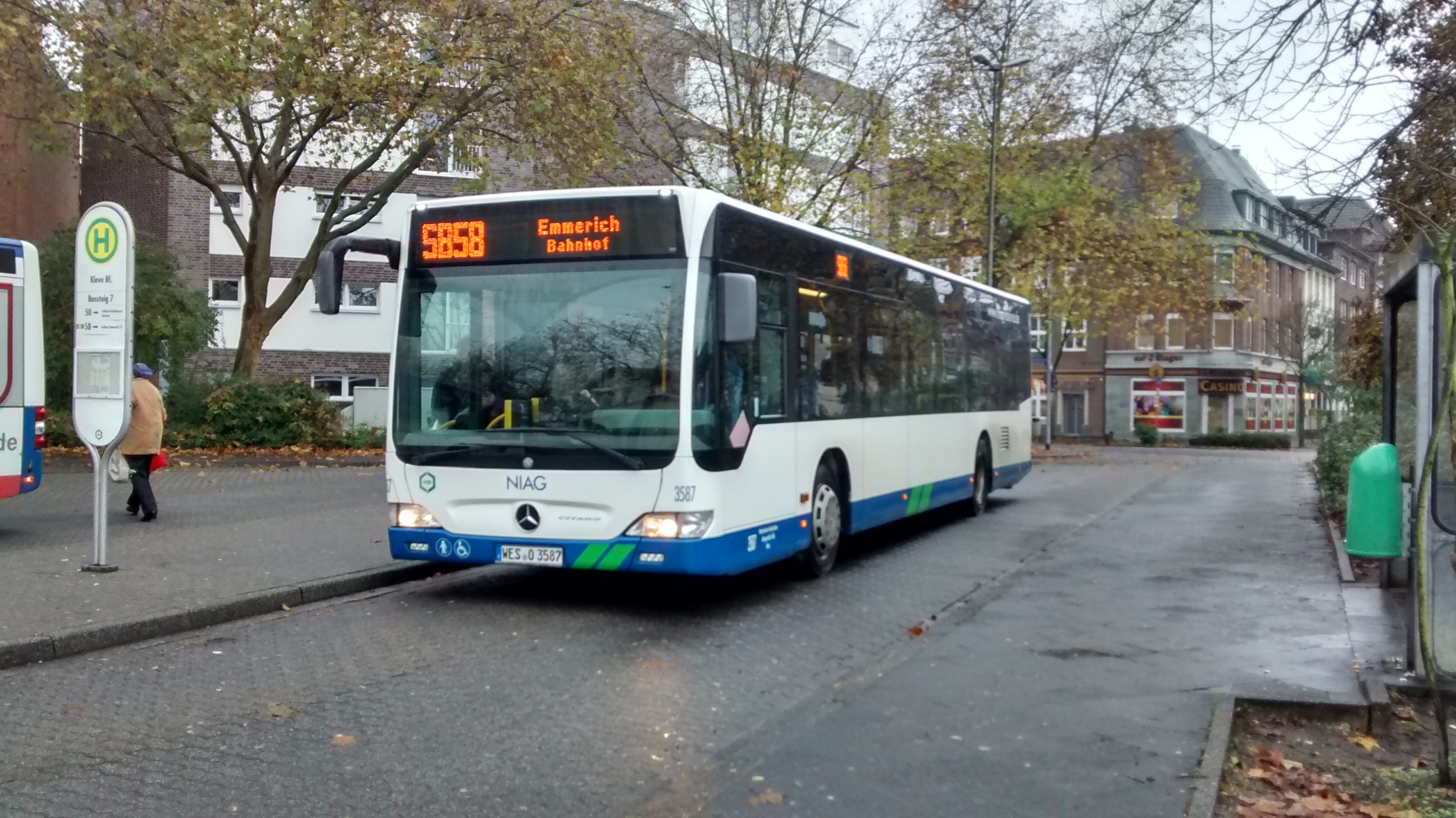 Impressionen aus Kleve vom 16. November 2014.